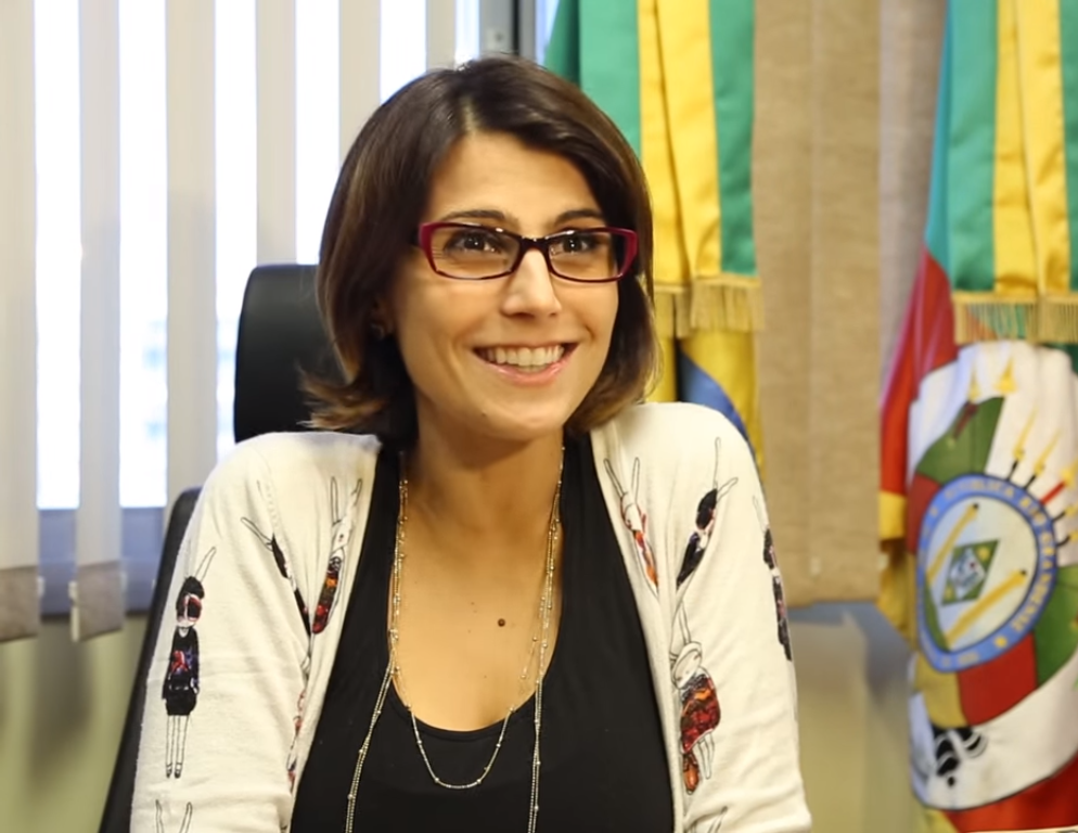 A deputada estadual Manuela d'Ávila durante uma entrevista em maio de 2015.